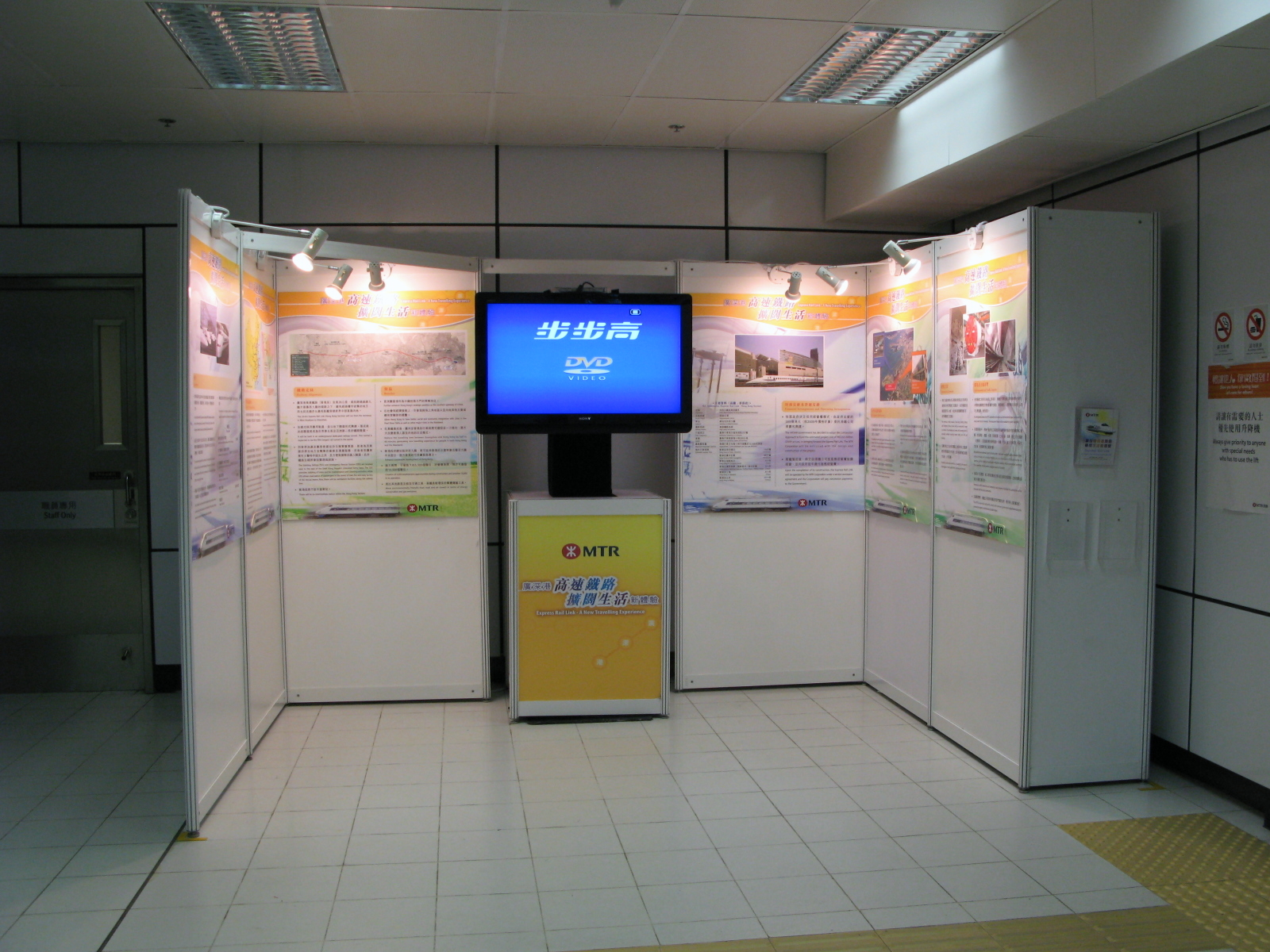 Guangzhou-Shenzhen-Hong Kong Express Rail Link Exhibit 廣深港高速鐵路展覽